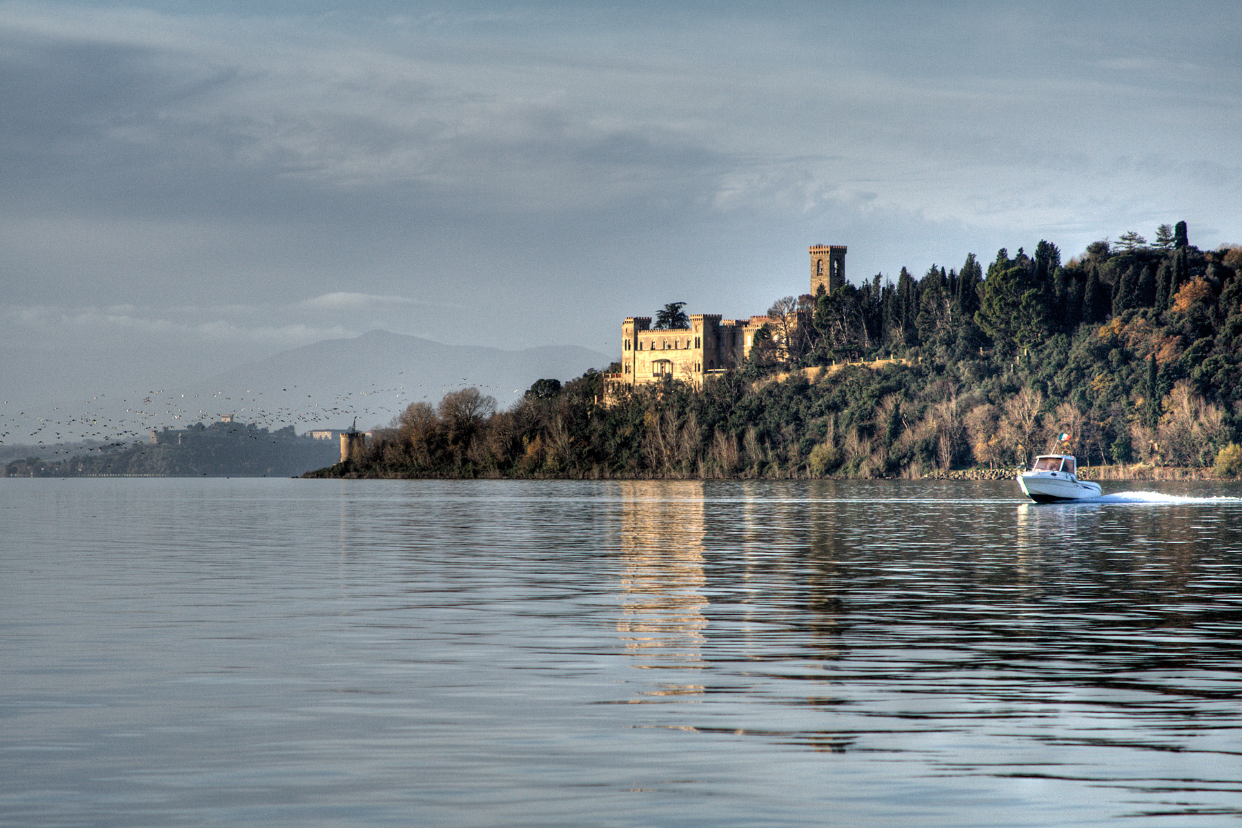 Isola Maggiore